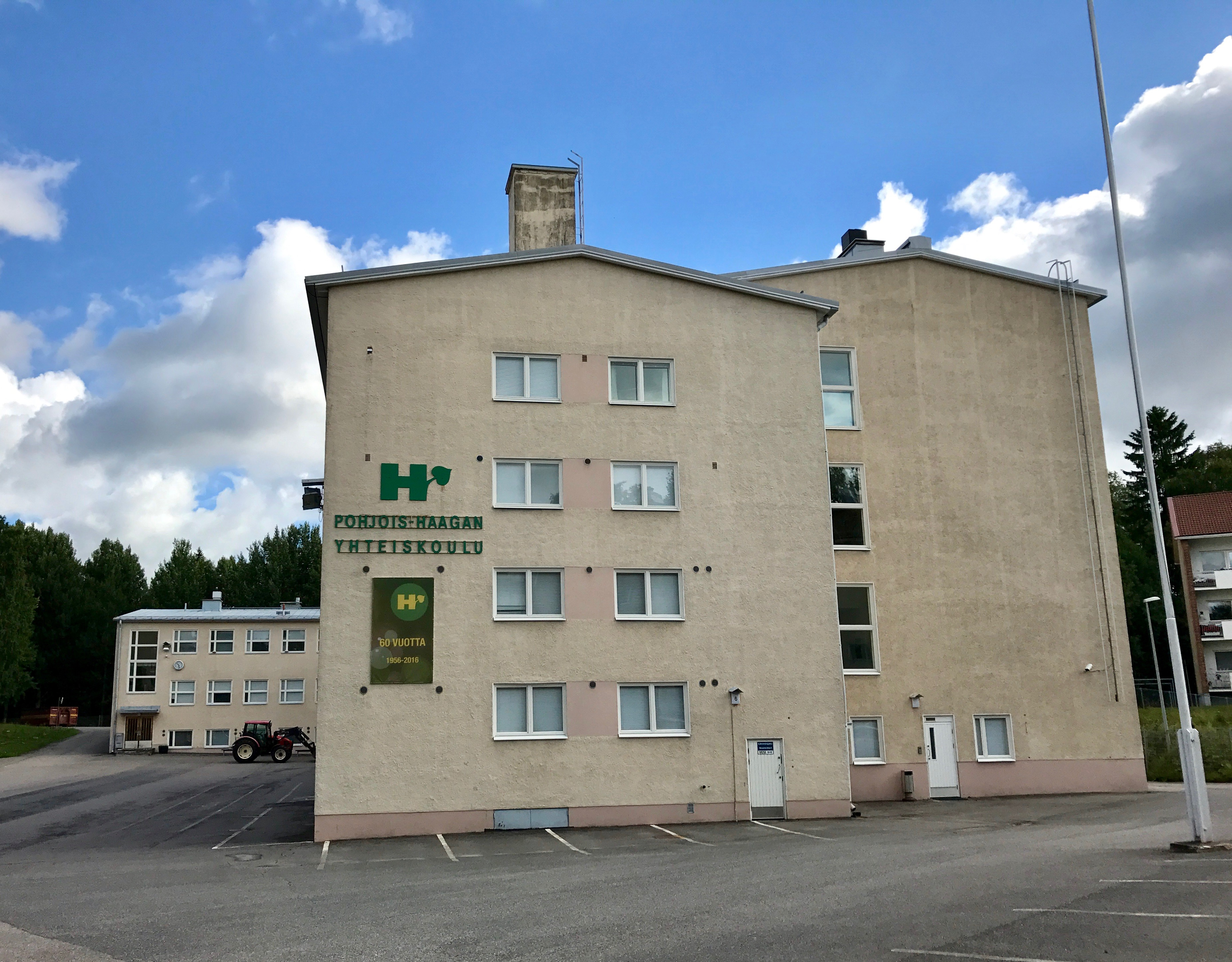 Pohjois-Haagan yhteiskoulu Helsingin Haagassa